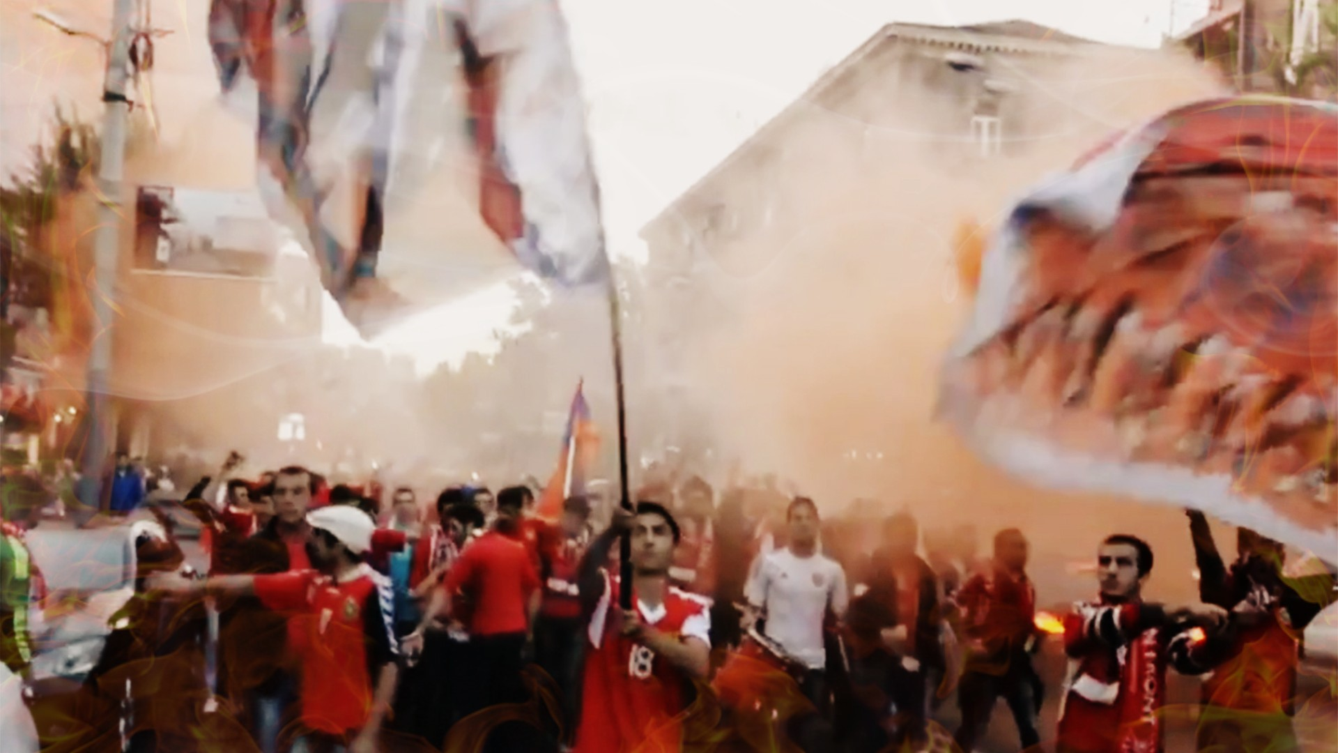 Երթ Հայաստան Սերբիա հանդիպումից առաջ